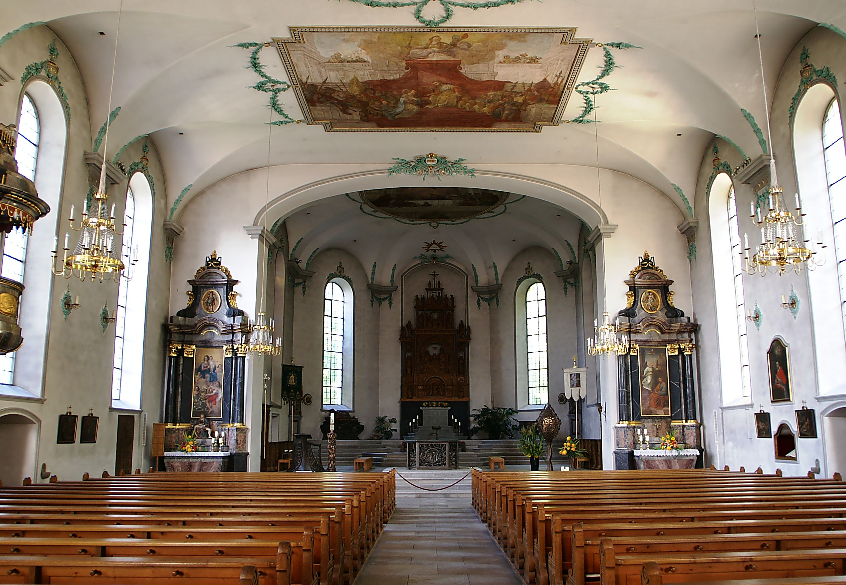 Pfarrkirche St.Karl in Hohenems , Vorarlberg.